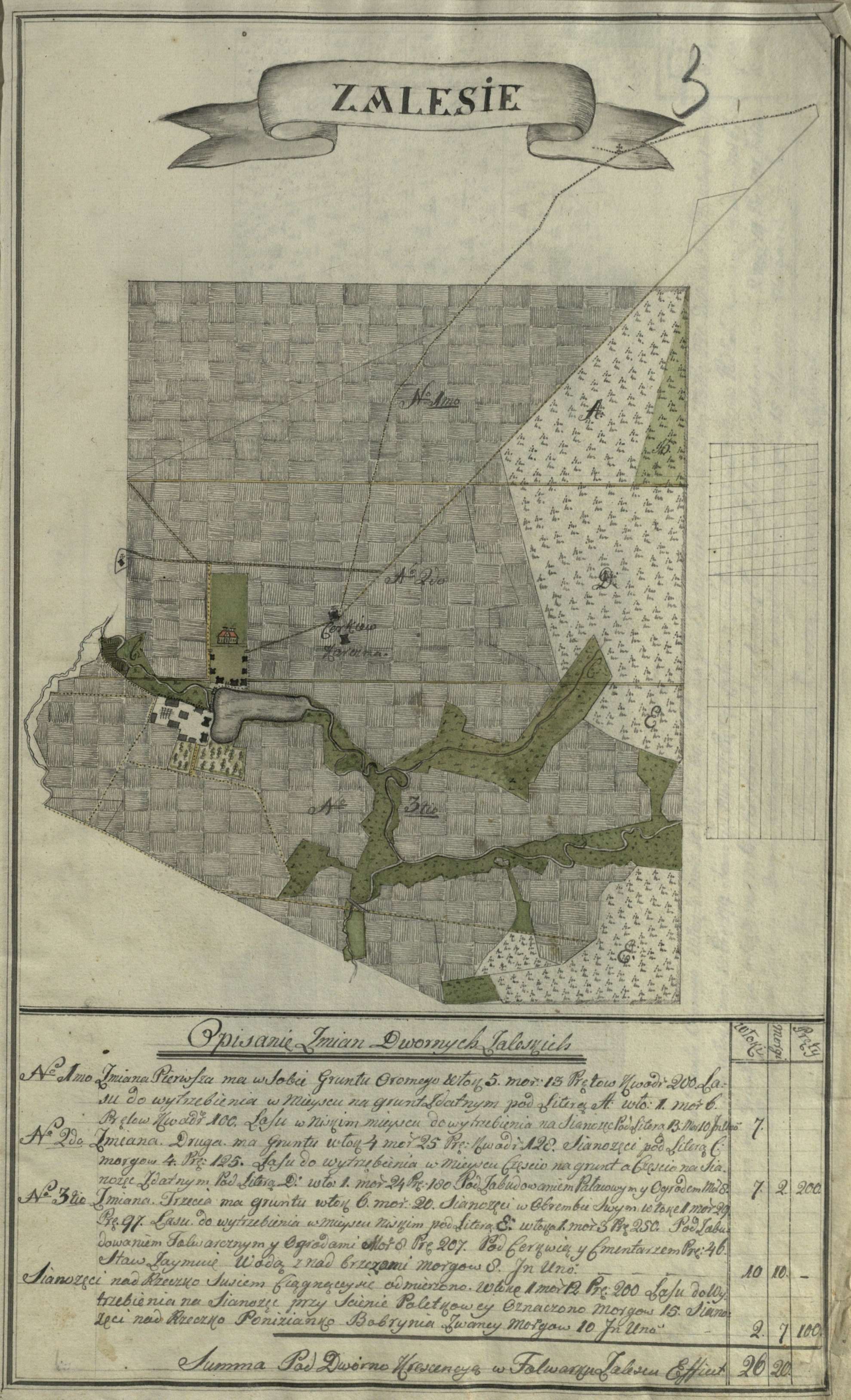 Беларуская (тарашкевіца): Залесьсе (Zaleśsie), сядзіба Агінскіх (Aginski)